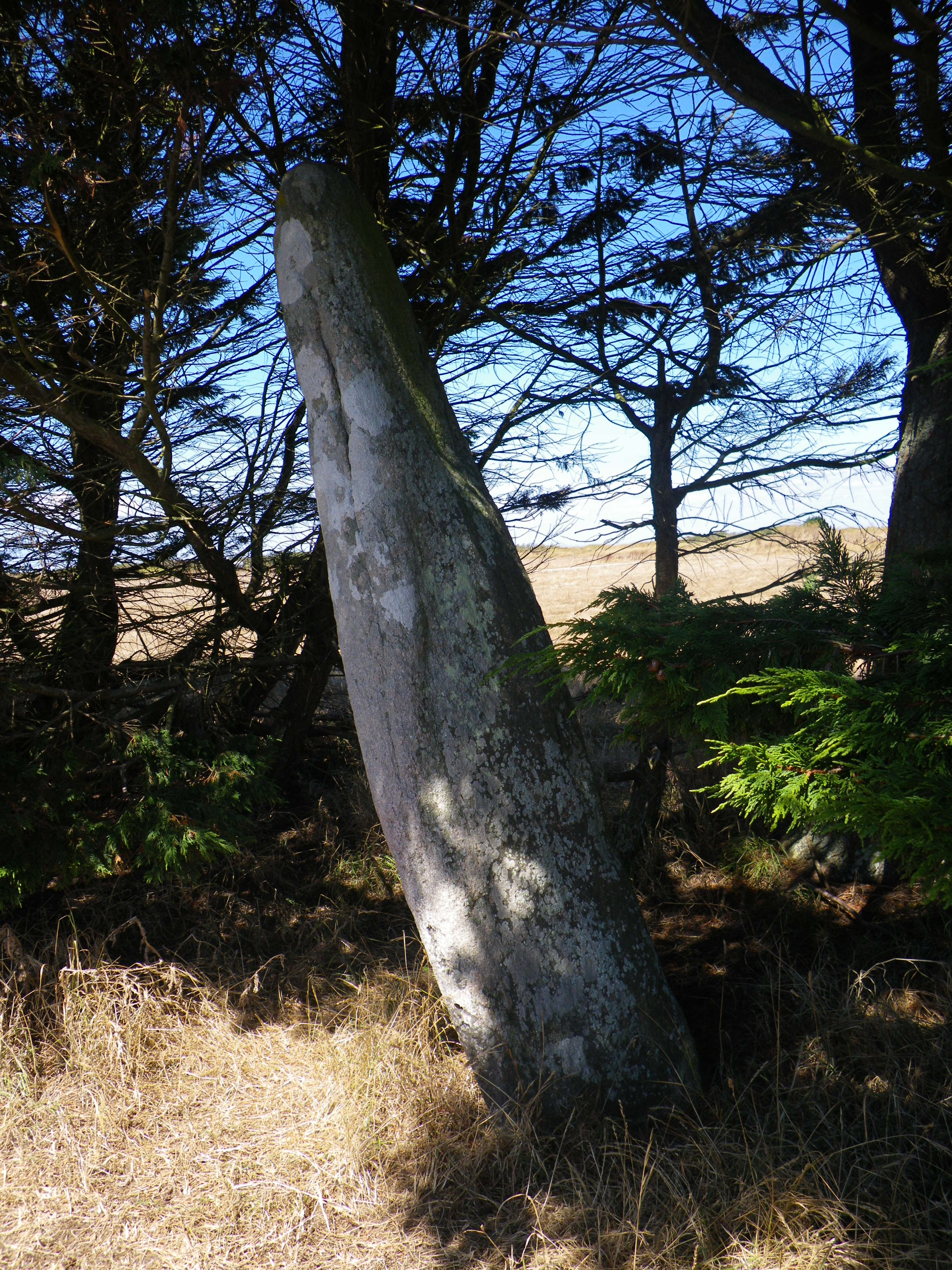 Menhir a Houat indiqué sur la Carte IGN Belle Ile - Menhir de Parc-er-Menhir .